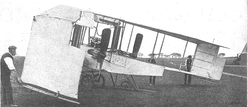 Dunne D.5 experimental aircraft